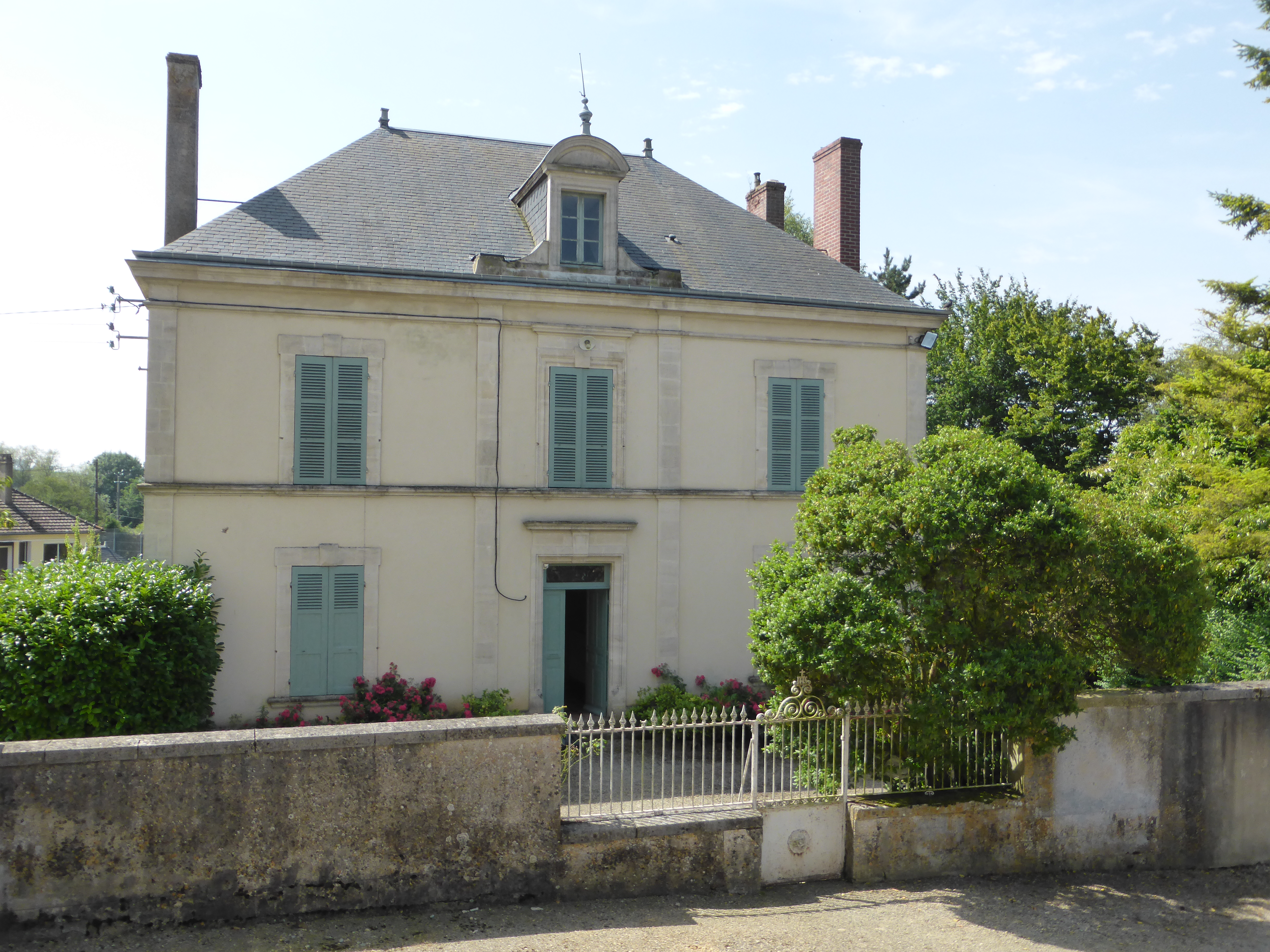 Presbytère du Gué-de-la-Chaîne, dans l'Orne